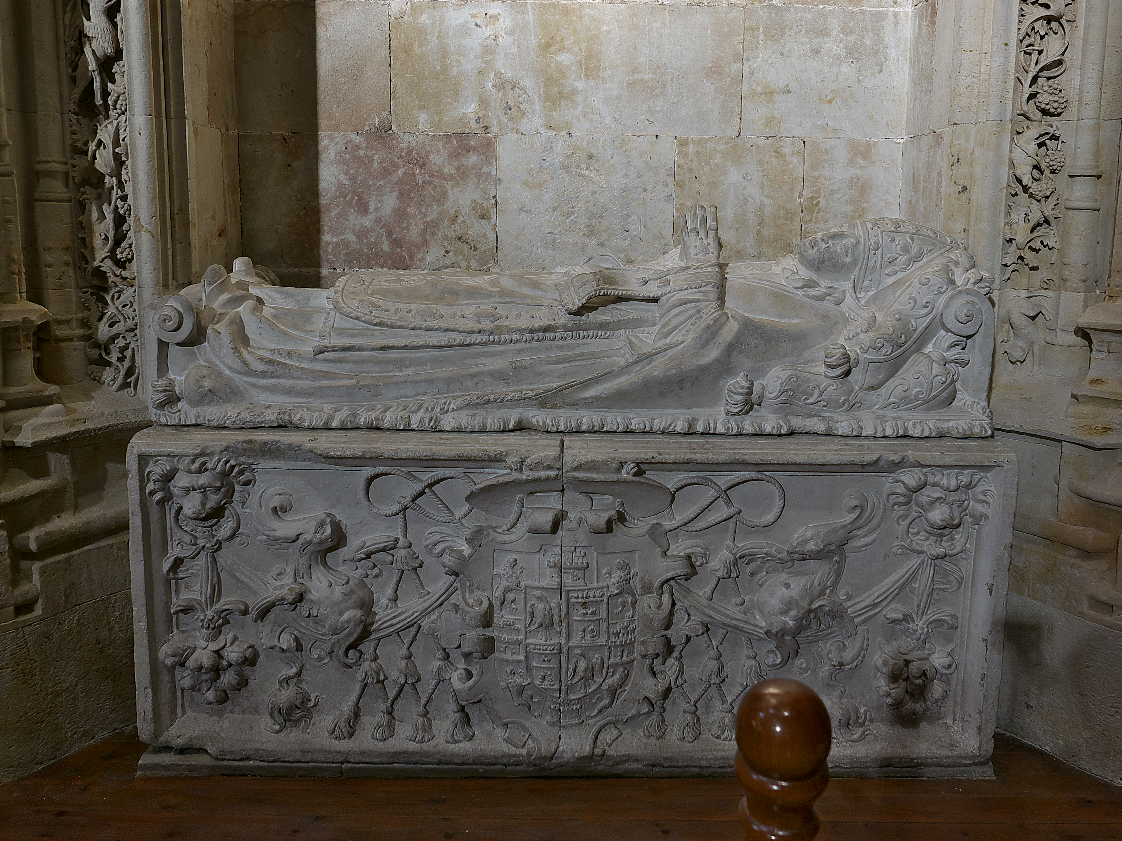 Crucero de la Catedral Nueva de Salamanca. Sepulcro, esculpido por Lucas Mitata (h. 1528), del obispo Francisco de Bobadilla (1529) que colocó la primera piedra (1512) de la catedral.